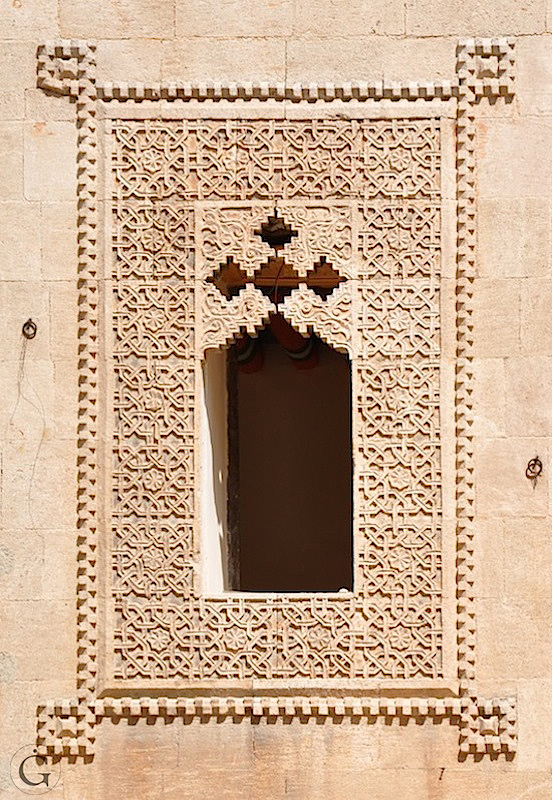 Détail du travail de la pierre sur la façade nord de la maison Ghazaleh à Alep